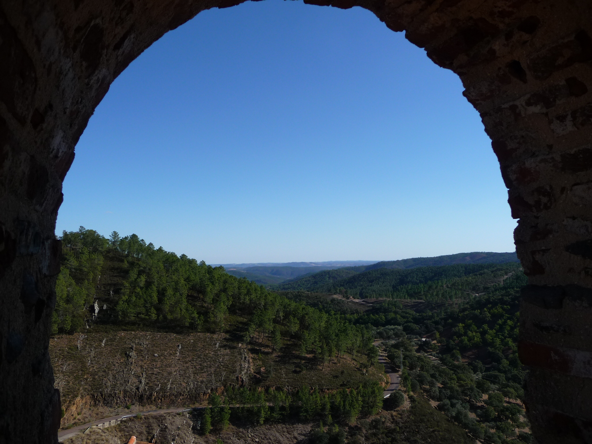 AlmonasterLaReal-P1040850.JPG